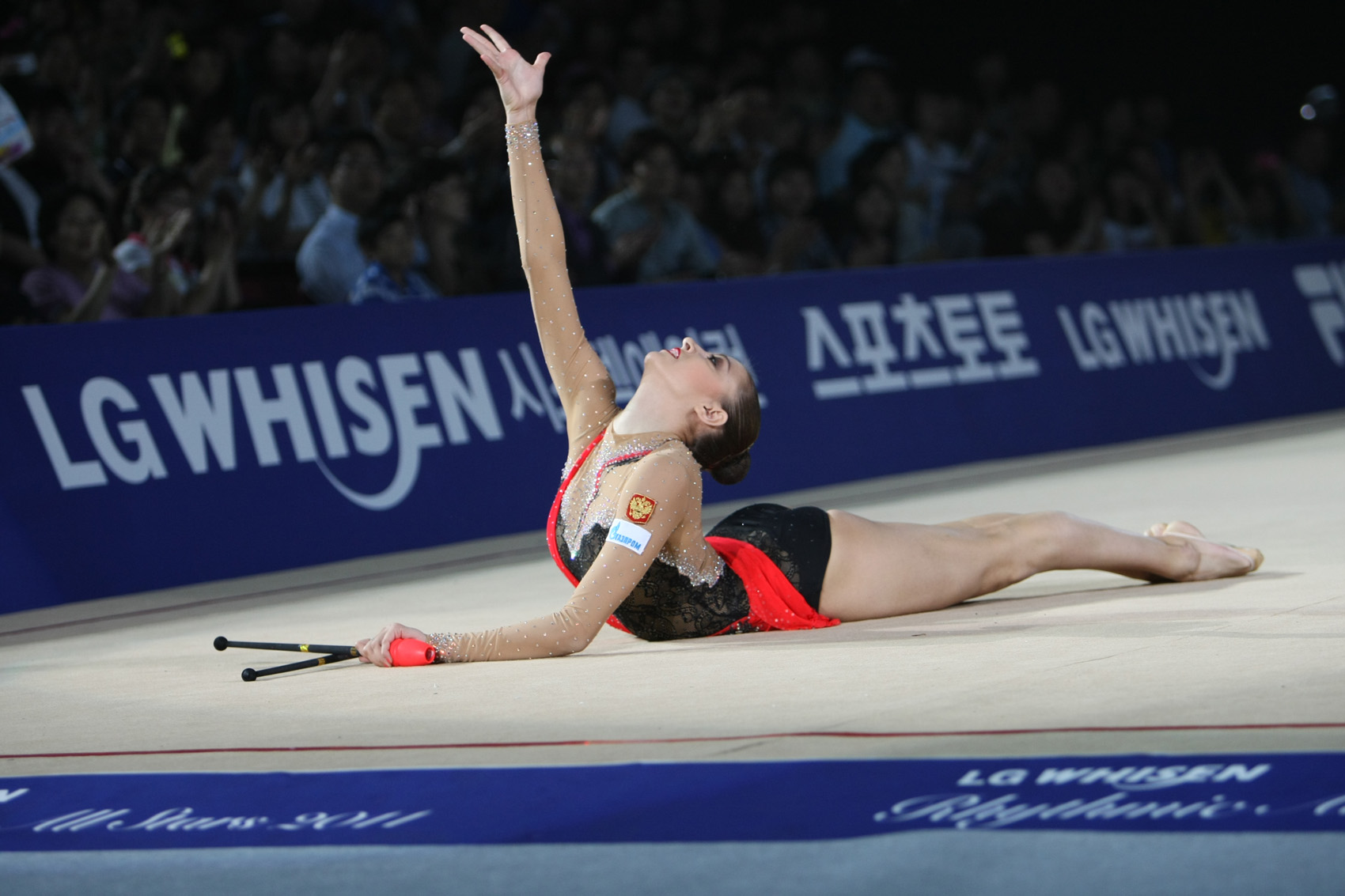 LG전자가 11일(土, 오후 3시), 12일(日, 오후 2시) 양일간 고려대학교 화정체육관 특설무대에서 국내 최초 리듬체조 갈라쇼인 ‘LG WHISEN Rhythmic All Stars 2011’ 행사를 개최했다. 사진은 11일 고려대학교 화정체육관 특설무대에서 열린 ‘LG WHISEN Rhythmic All Stars 2011’ 행사에서 LG ‘휘센’ 광고모델인 손연재(18세, 세종고) 선수를 비롯해 국내외 전•현역 리듬체조 스타들이 총출동해 멋진 리듬체조를 보여줬다.